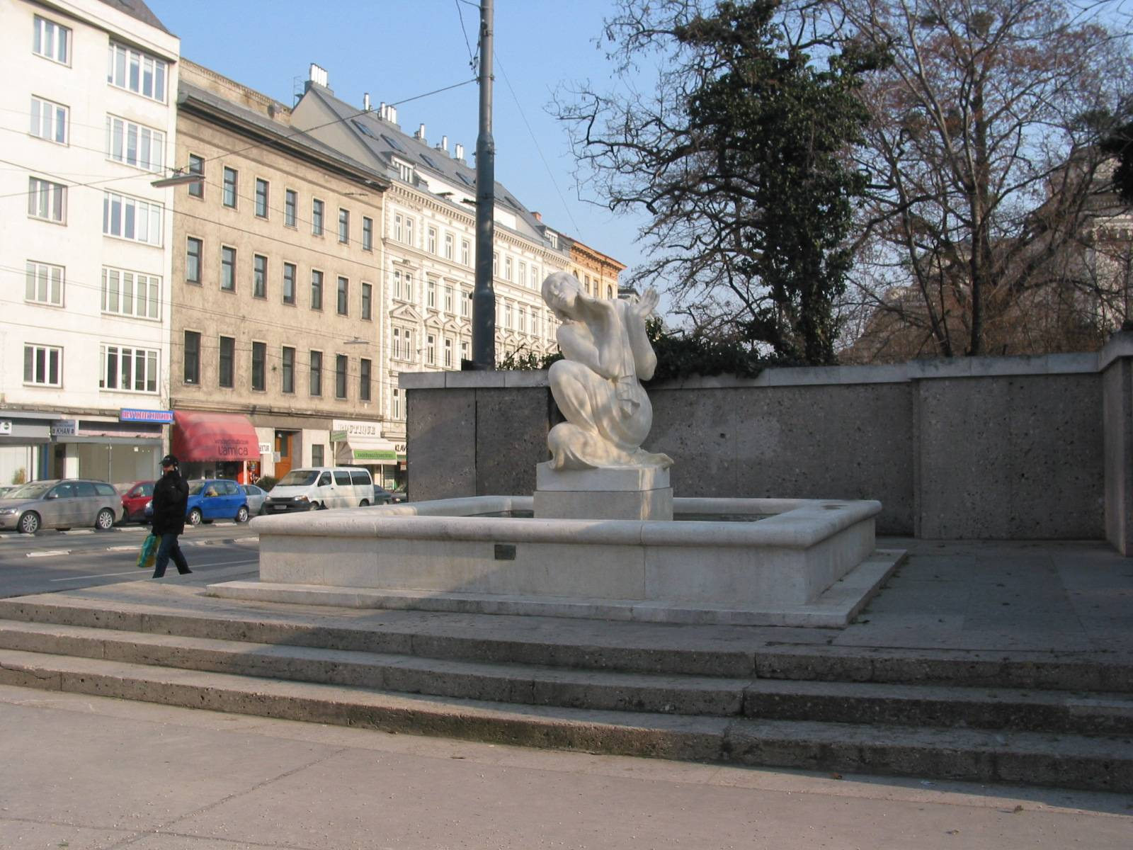 Schubertbrunnen, Vienna IX, an der Kreuzung Alserbachstraße, Liechtensteinstraße. 2006-01-28 selfmade photo